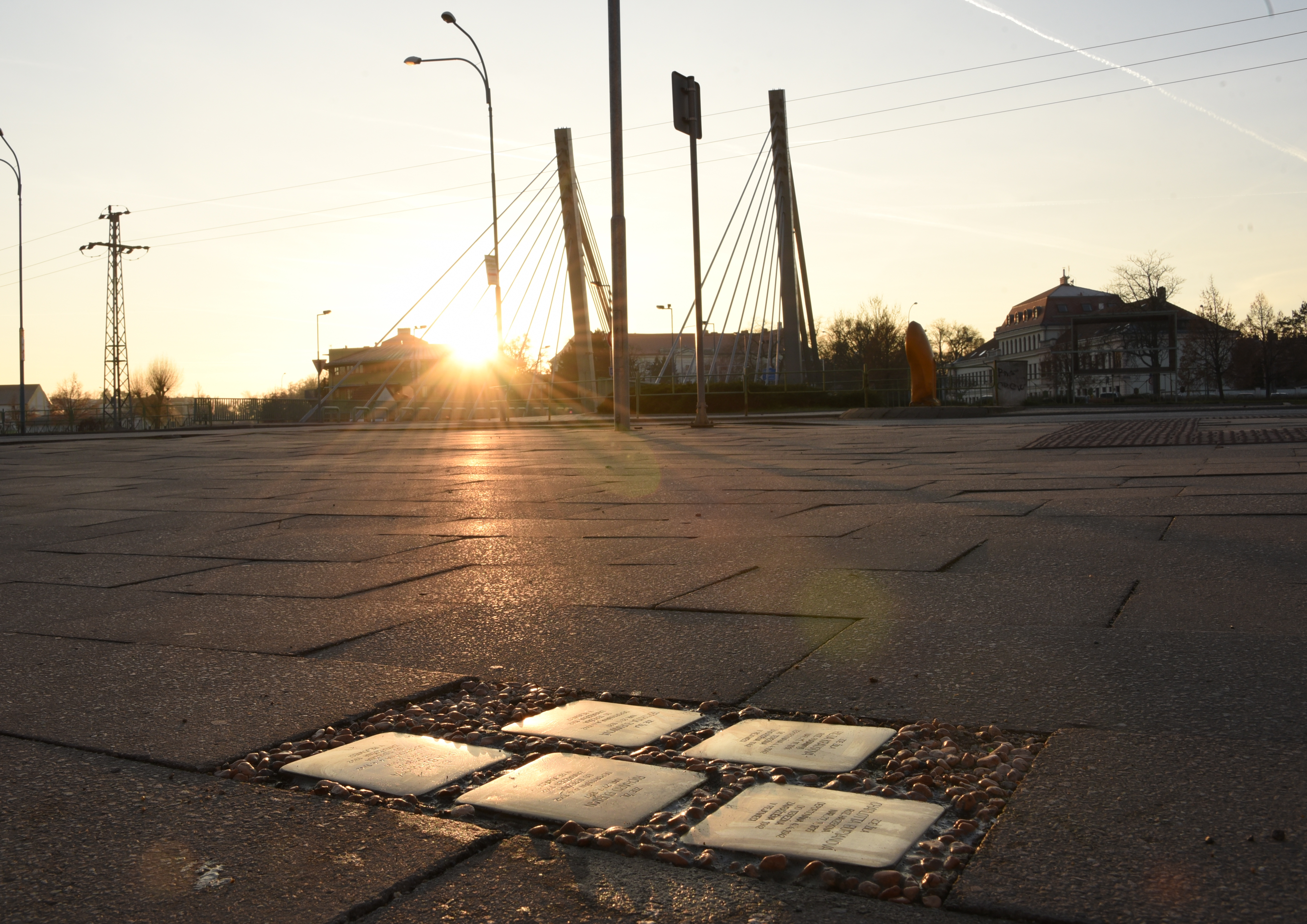 Fünf Stolpersteine in Židlochovice für Familie Burian Námestí Míru 156